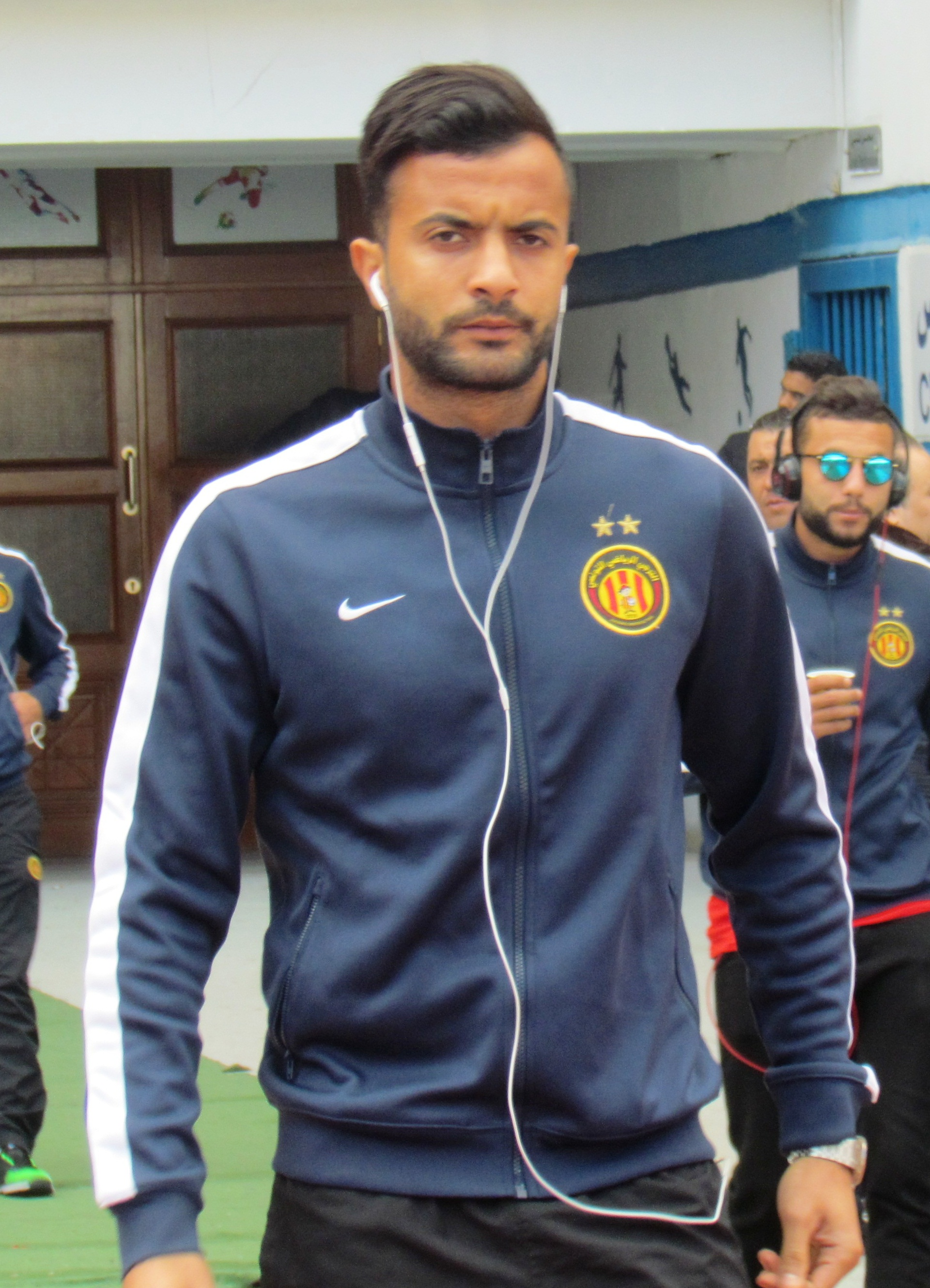 Taha Yassine Khenissi avant le derby tunisois du 1 mars 2017